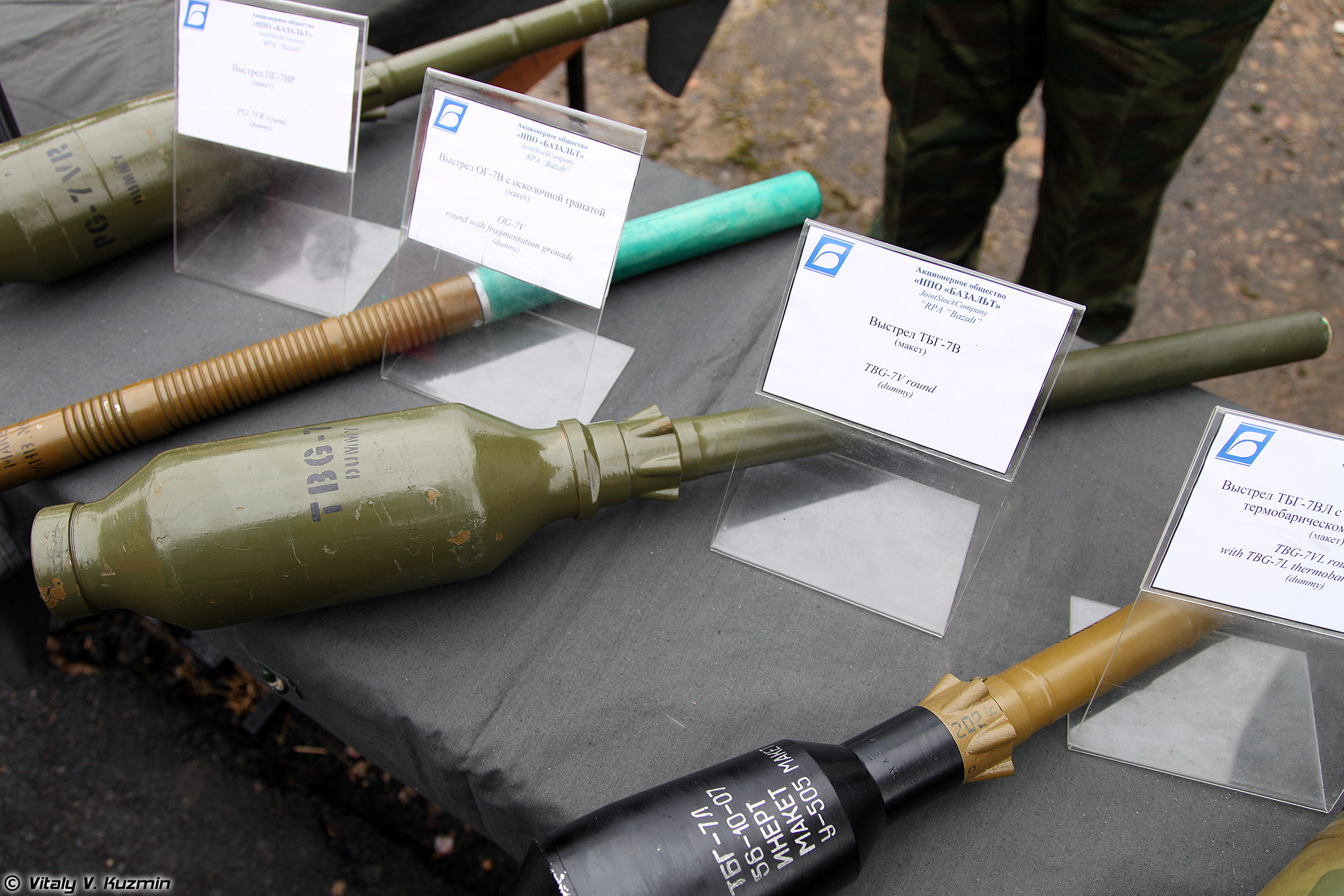 Выстрел ТБГ-7В